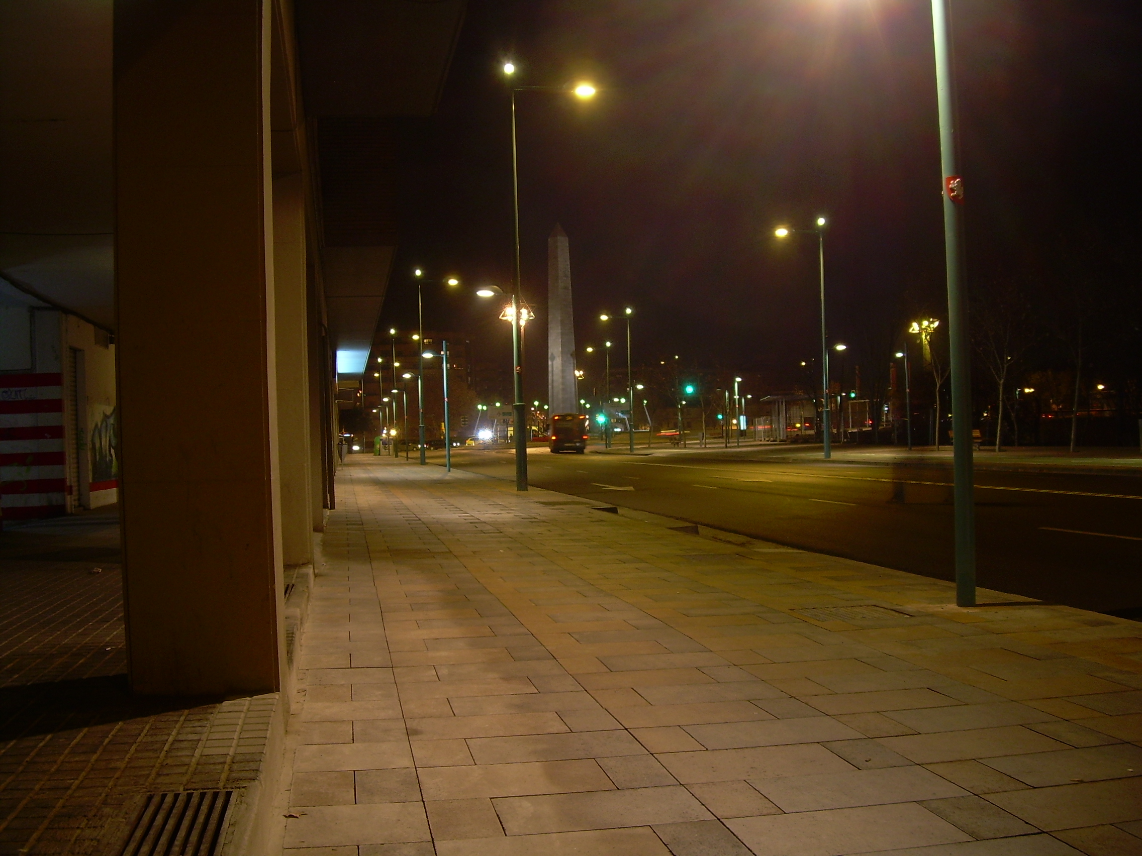 Paseo de Echegaray y Caballero, Zaragoza, Aragón.